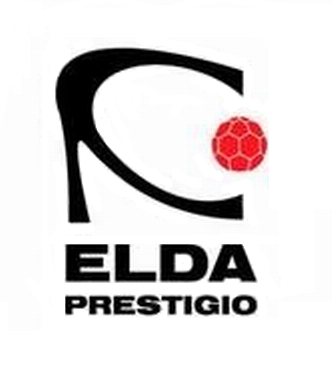 Escudo del Balonmano Elda Prestigio